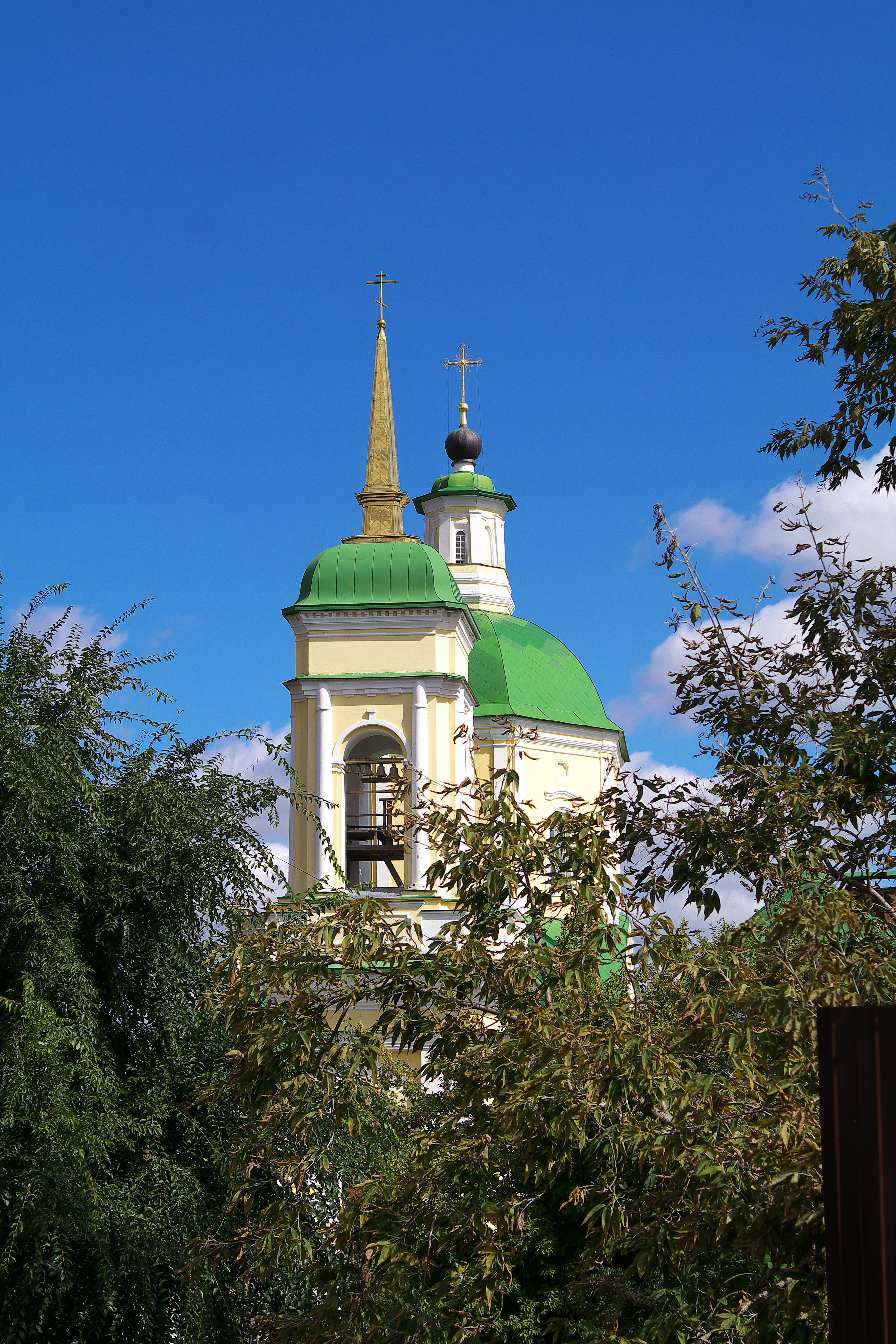 Воскресенская церковь (Воронежская область, Воронеж, Орджоникидзе улица, 21)